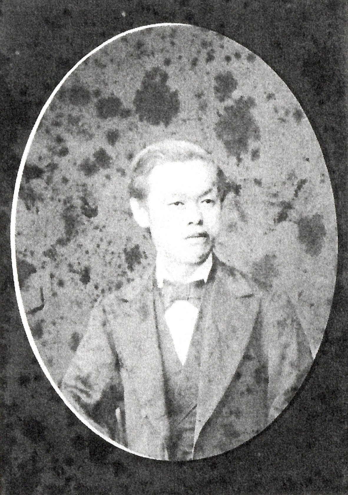 錦織教久の肖像写真。